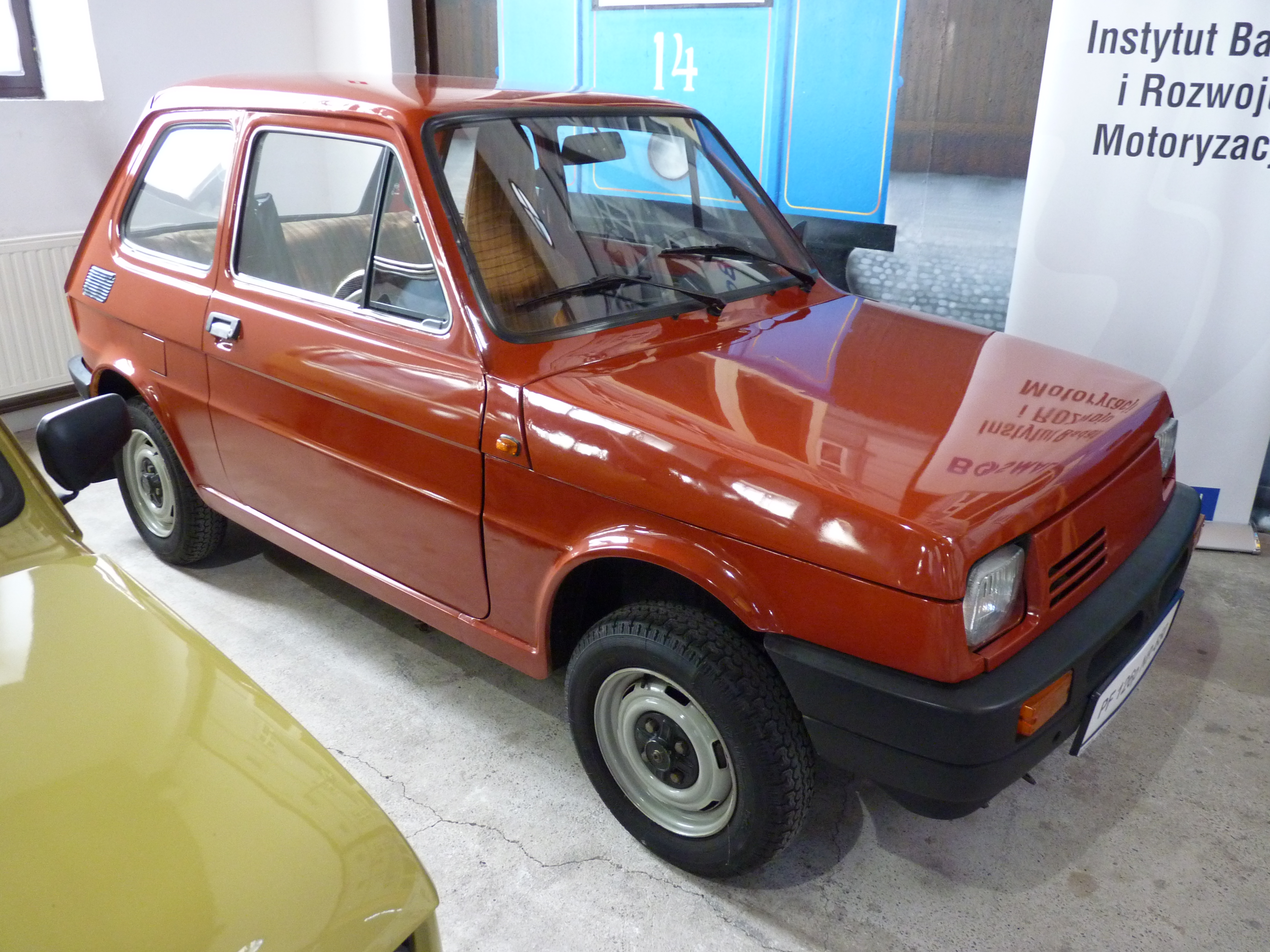 Muzeum Inżynierii Miejskiej